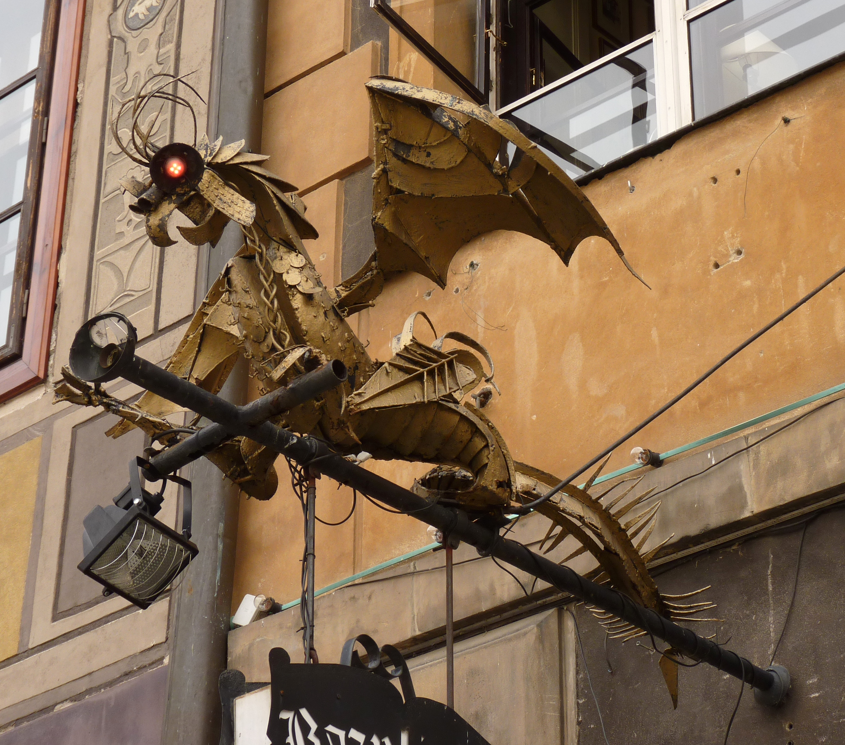 Warszawa, kamienica